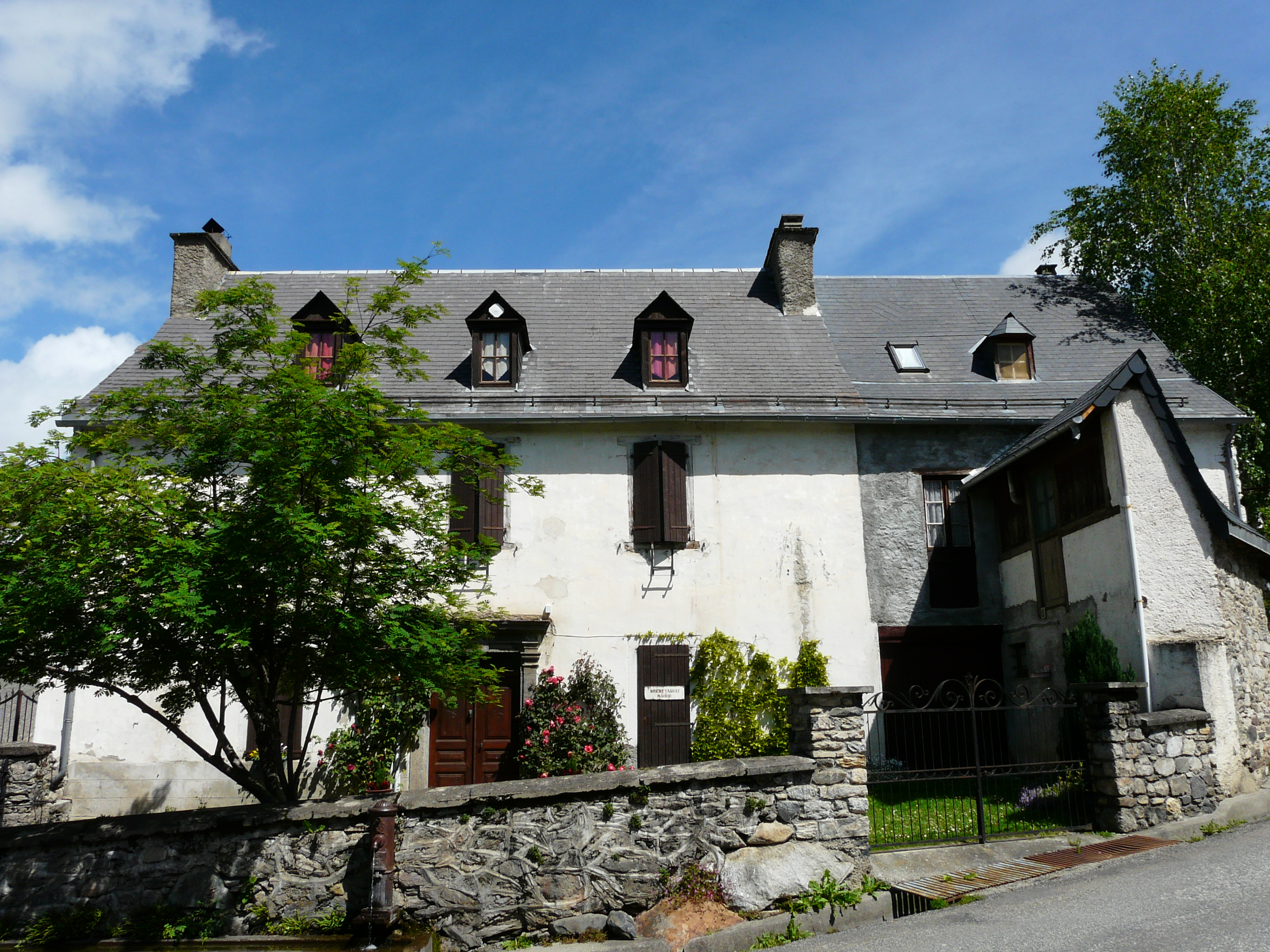 La mairie de Saint-Paul-d'Oueil, Haute-Garonne, France.